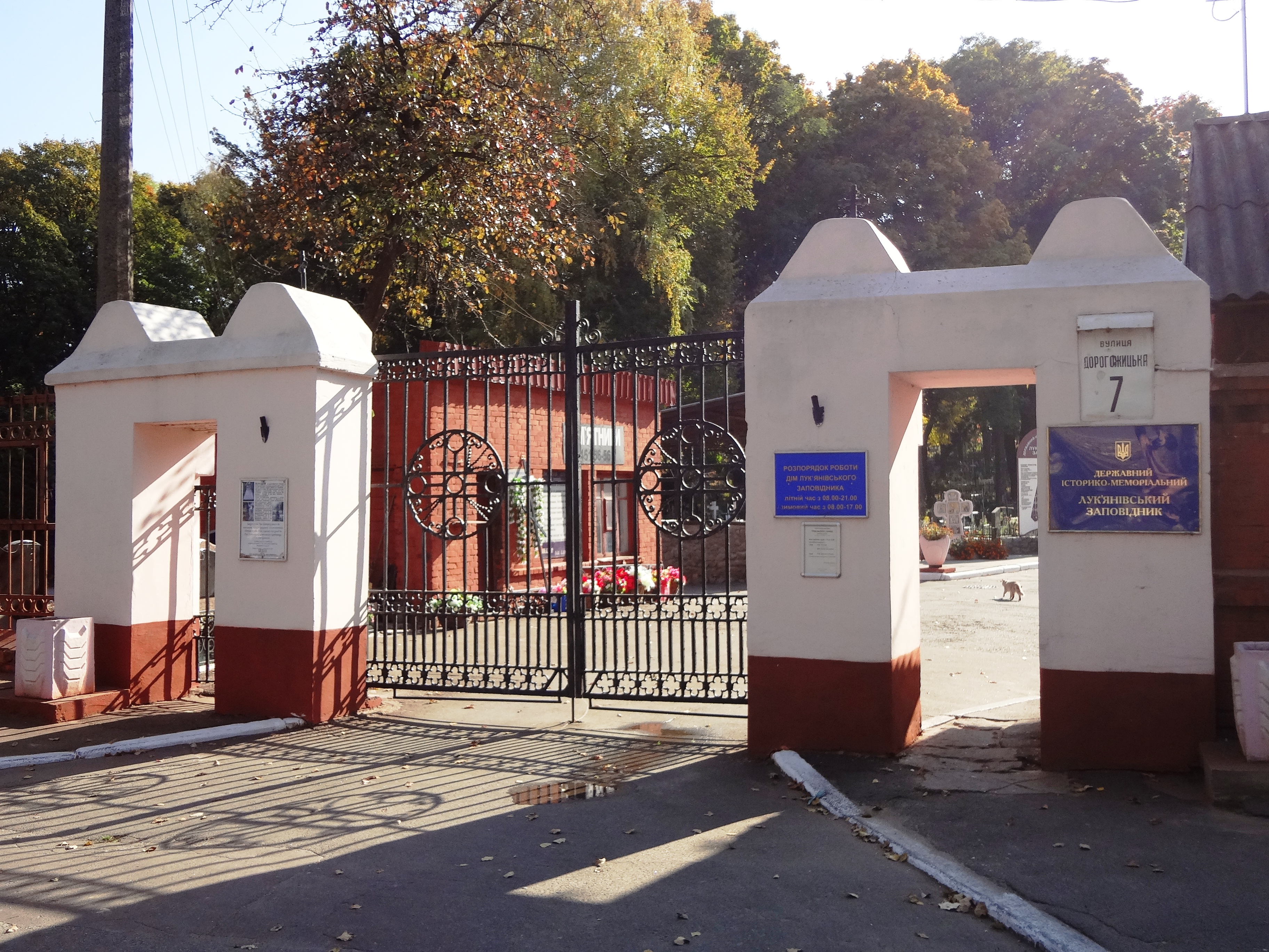 Комплекс пам'яток «Лук'янівське кладовище» (ДІМ «Лук'янівський історико-меморіальний заповідник») Див.: Перелік об'єктів культурної спадщини Лук'янівського кладовища, Київ, Дорогожицька вул., 7